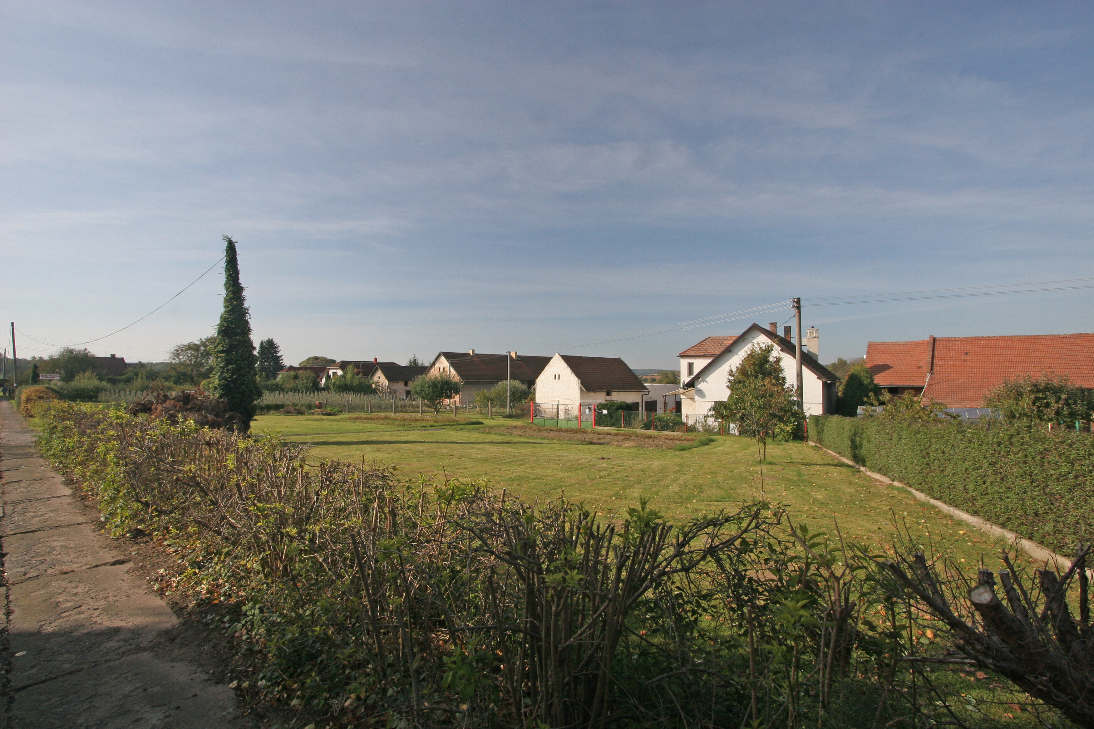 Klenovka čp. 5